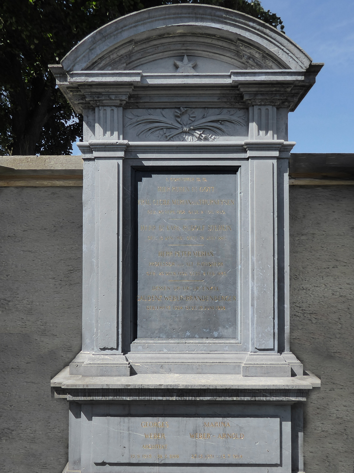 Karl Rudolf Stehlin (1831-1881), Dr. jur. Anwalt, Politiker, Verwaltungsrat im Basler Bankvereins, der Schweiz. Centralbahn, der Gotthardbahn und Schweiz. Eisenbahnbank. Grab auf dem Friedhof Wolfgottesacker, Basel